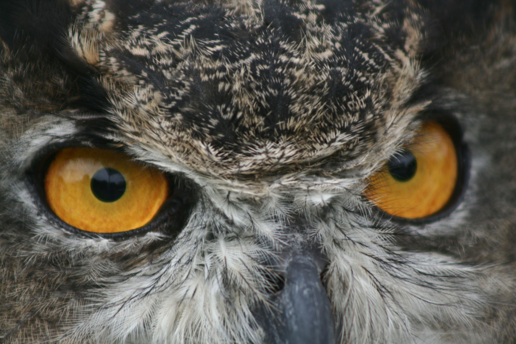 John Heinz National Wildlife Refuge, PA Photo: Susan Rachlin USFWS